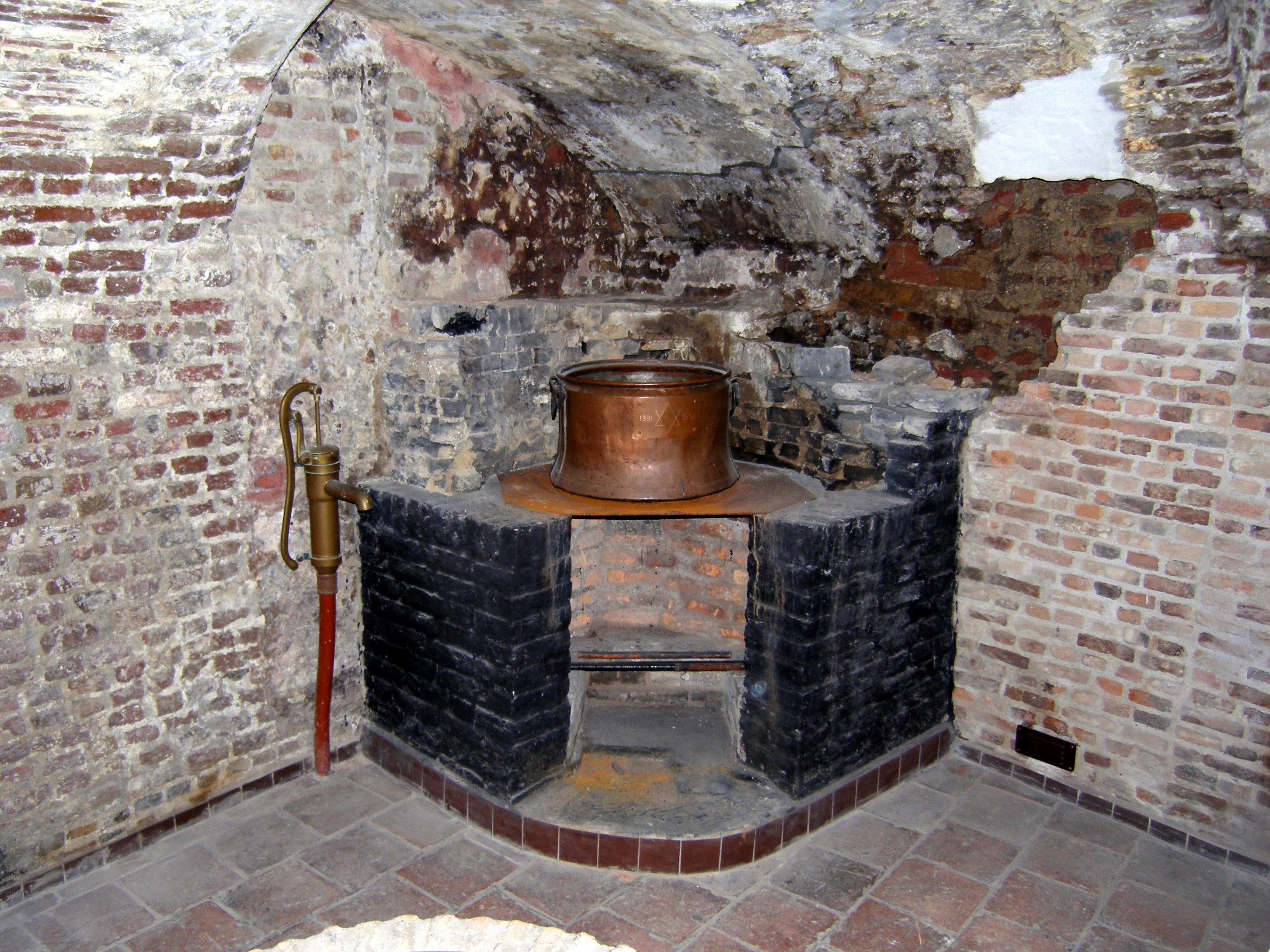 Fireplace in synagoge at Koevoetstraat 39, Bergen op Zoom.